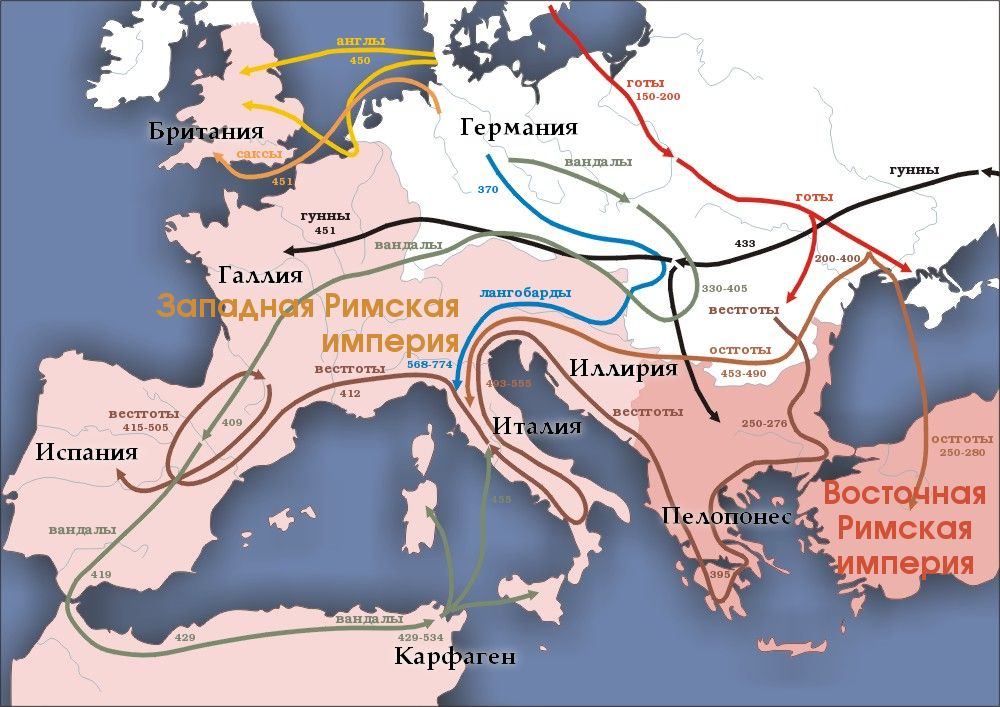 Карта Великого переселения народов Карта Европы (150—550 годы) с изображёнными на ней путями миграции народов (в основном германских)